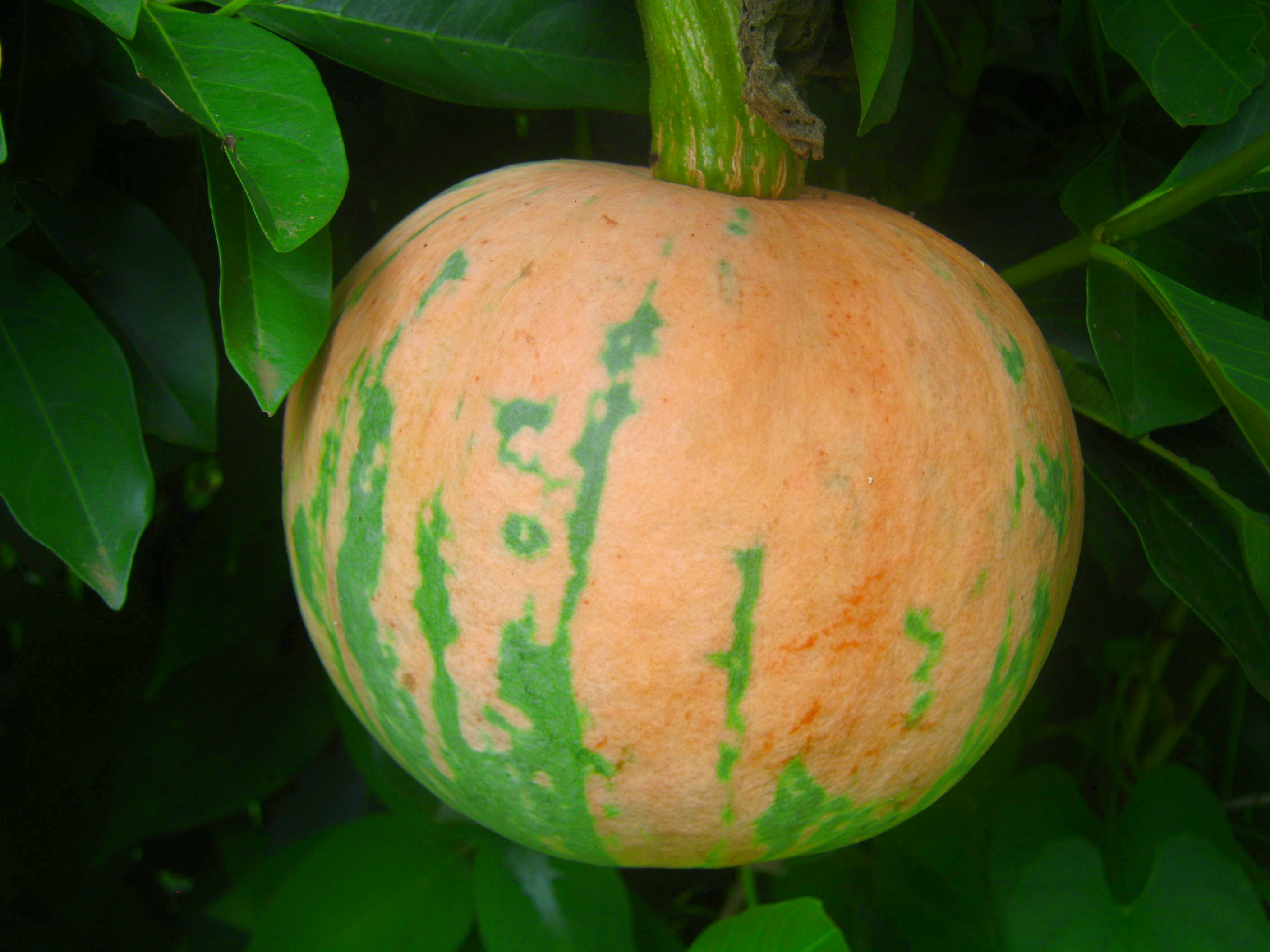 Le melon